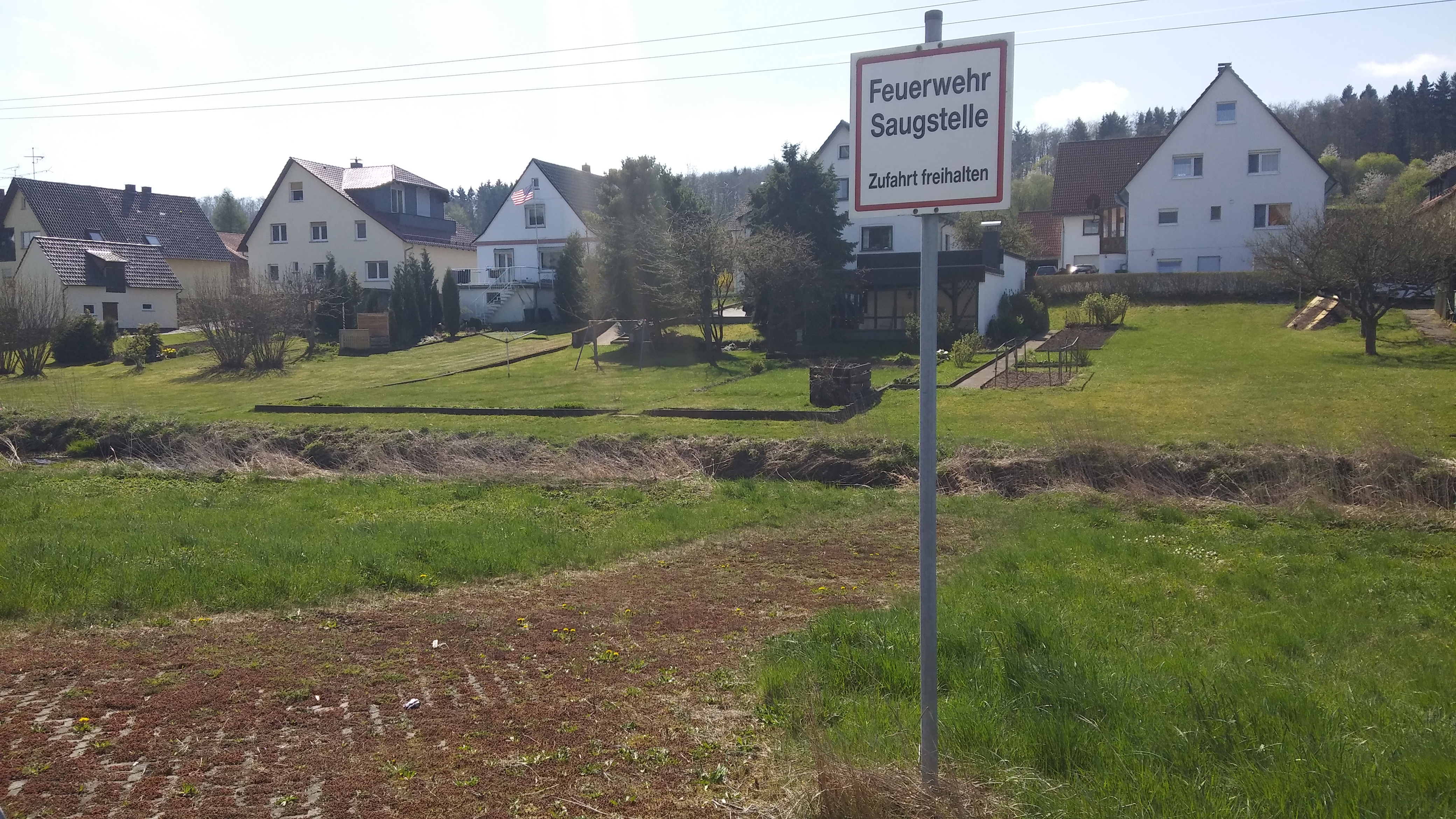 Zufahrt zur Saugstelle der Feuerwehr in Herbstein, Vogelsberg, Hessen